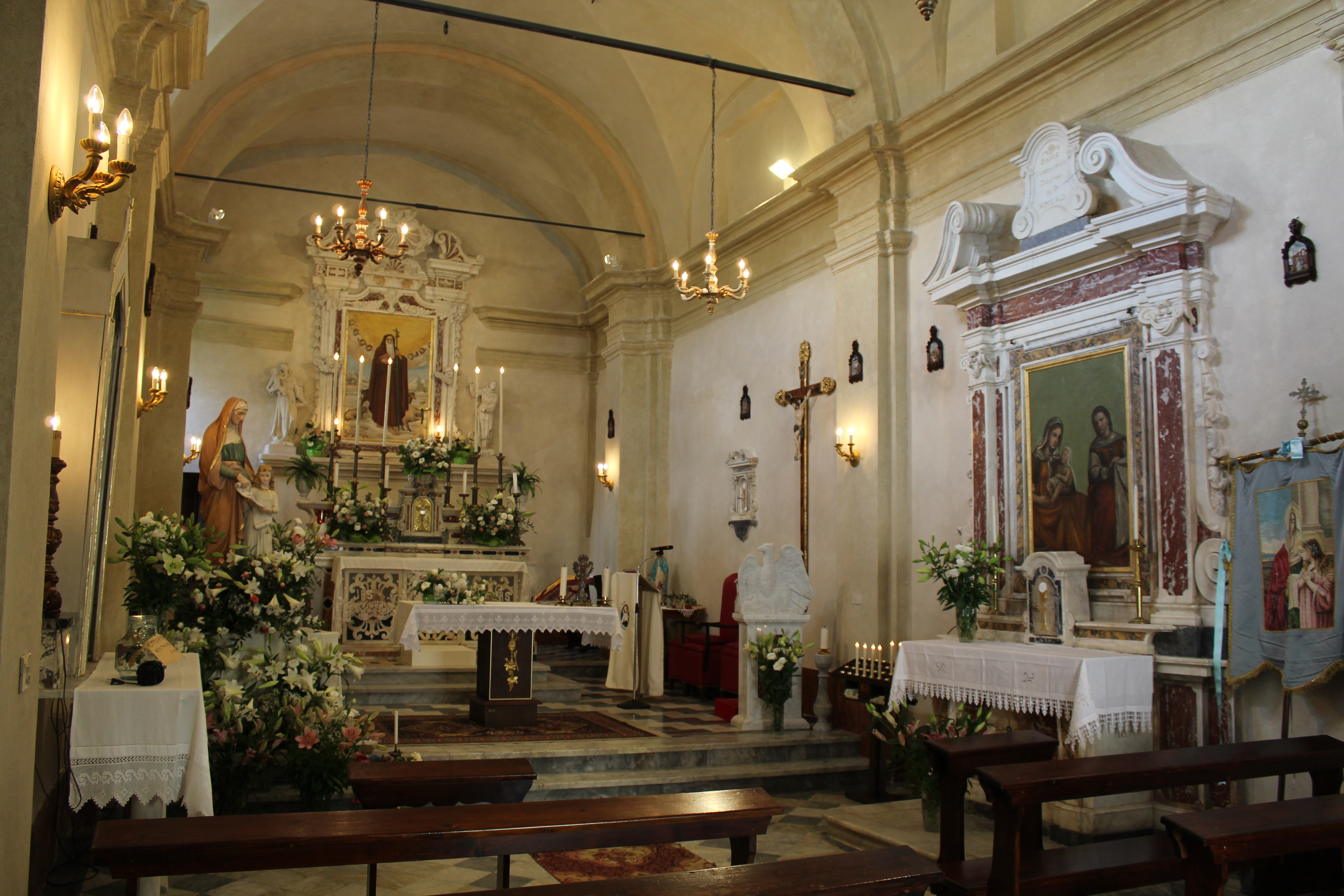 interni